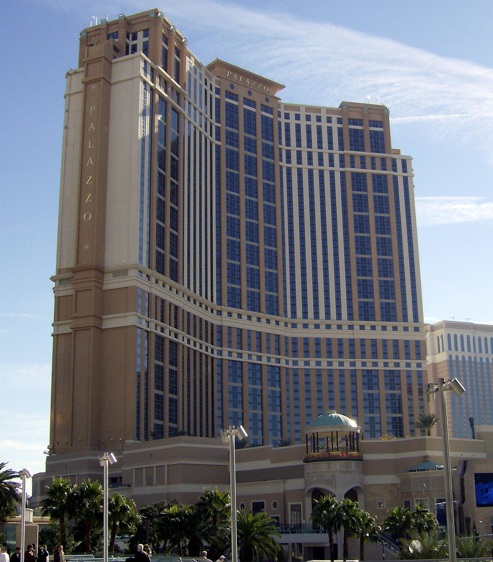 Hotel Palazzo en Las Vegas, Nevada